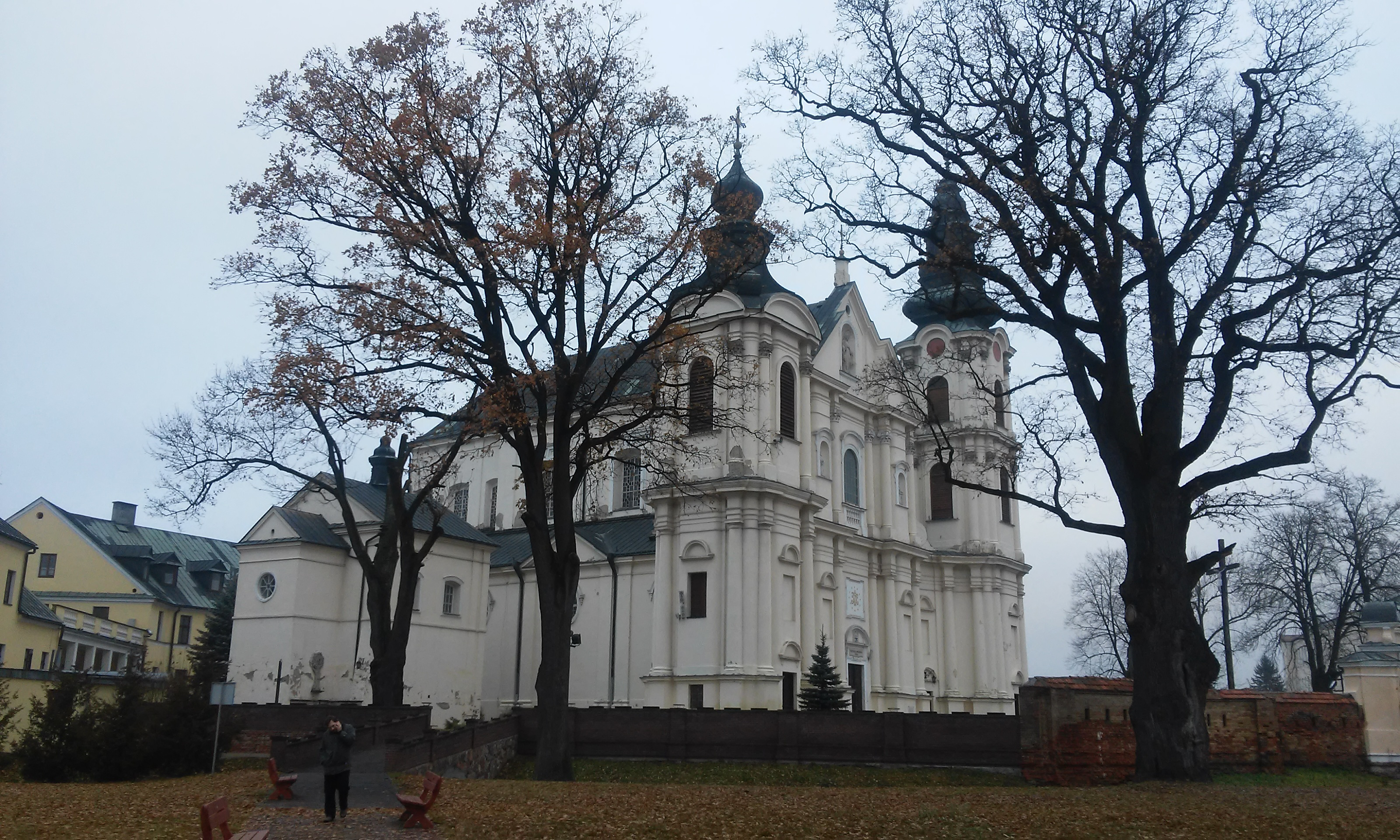 Widok na kościół klasztorny (bazylikę Świętych Piotra i Pawła) w Leśnej Podlaskiej od strony południowej